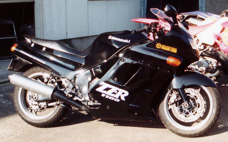 Kawasaki ZZR 1100